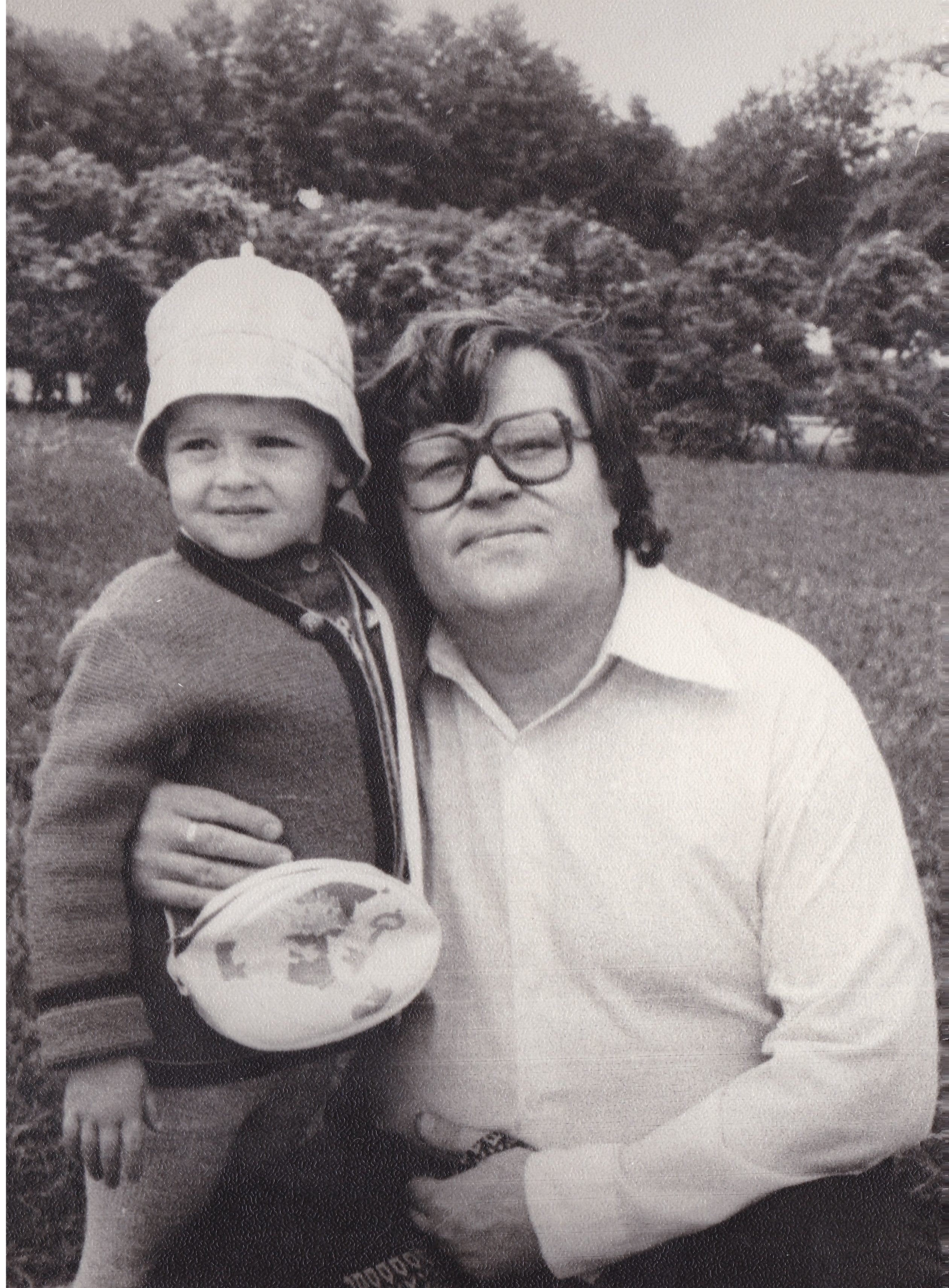 1982, СПб, тубист Валентин Галузин с дочкой Леной